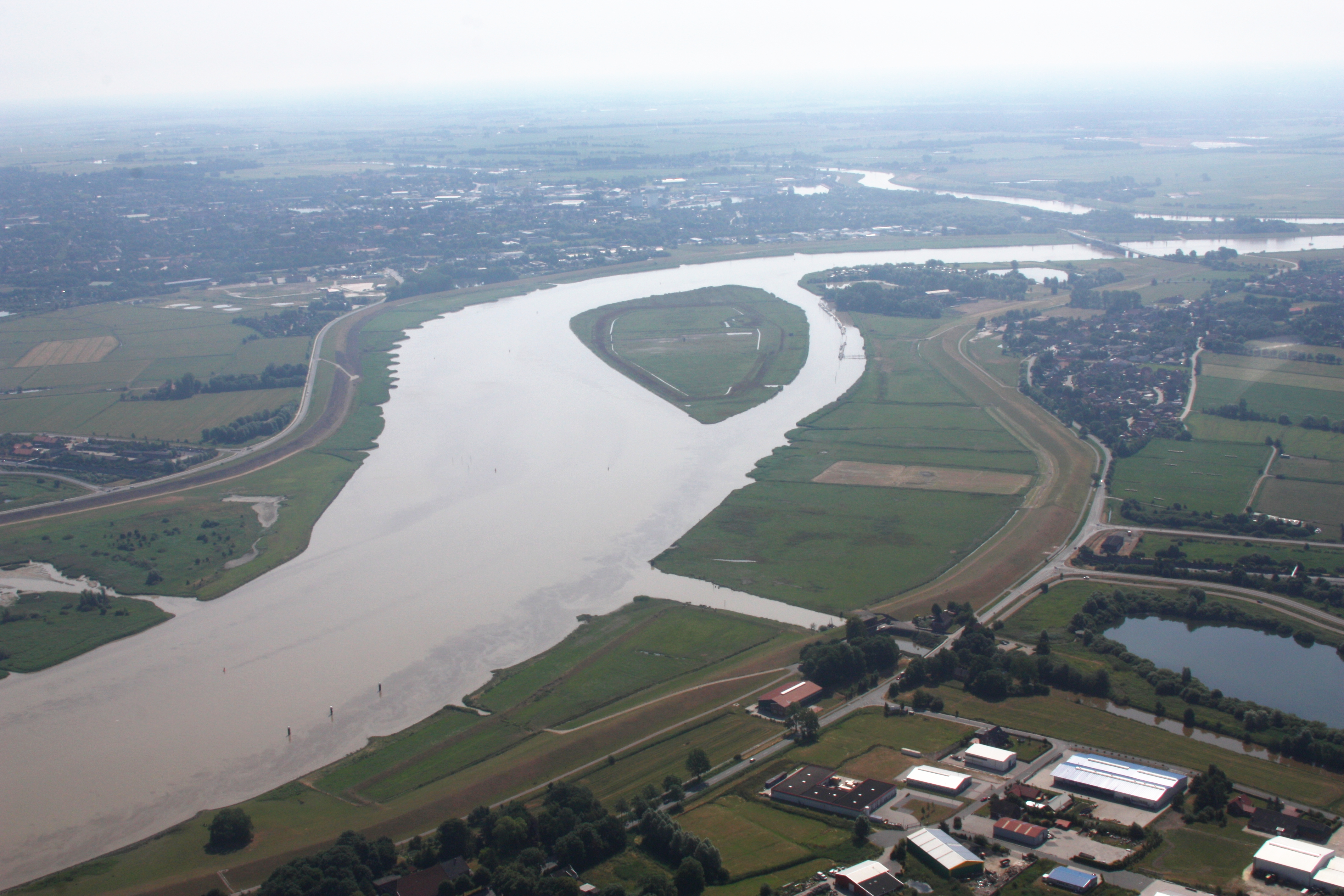 Luftaufnahme; Flug von Leer nach Emden; Flughöhe 1500 ft; Juli 2010; Originalfoto bearbeitet: Tonwertkorrektur und Bild geschärft mit Hochpassfilter